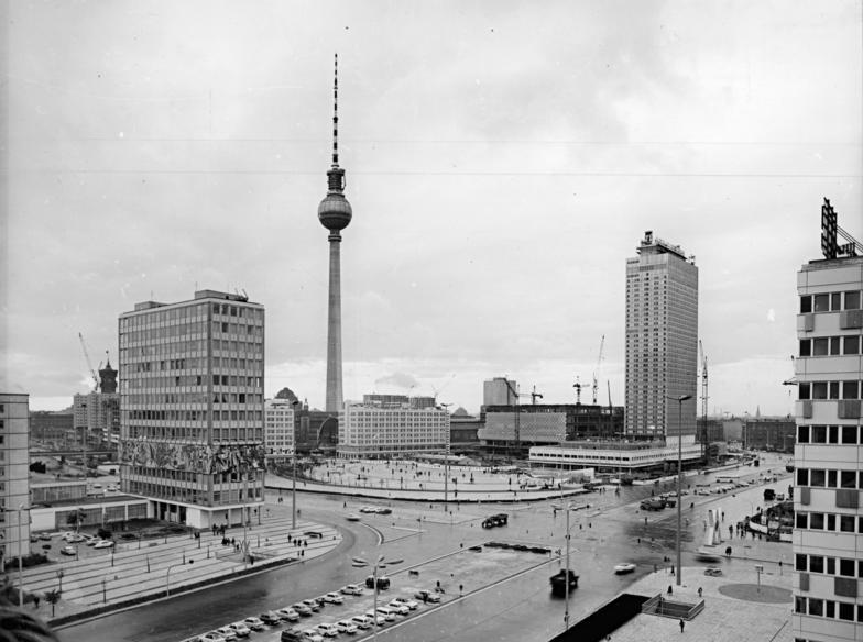 Berlin, Alexanderplatz, "Haus des Lehrers", Fernsehturm Zentralbild Sturm ch-Schä 2.10.1969 Berlin: 20. Jahrestag der DDR Zwanzig erfolgreiche Jahre prägen das neue Gesicht des "Alex", neues Zentrum der Hauptstadt der DDR. Die neuen Bauwerke Fernsehturm (M.) , Interhotel "Stadt Berlin" und das "Haus des Lehrers" beherrschen das Bild des neuen Zentrums.